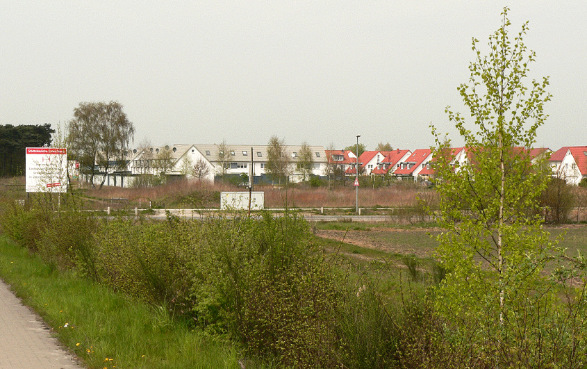 Ortsteil Schwarze Heide